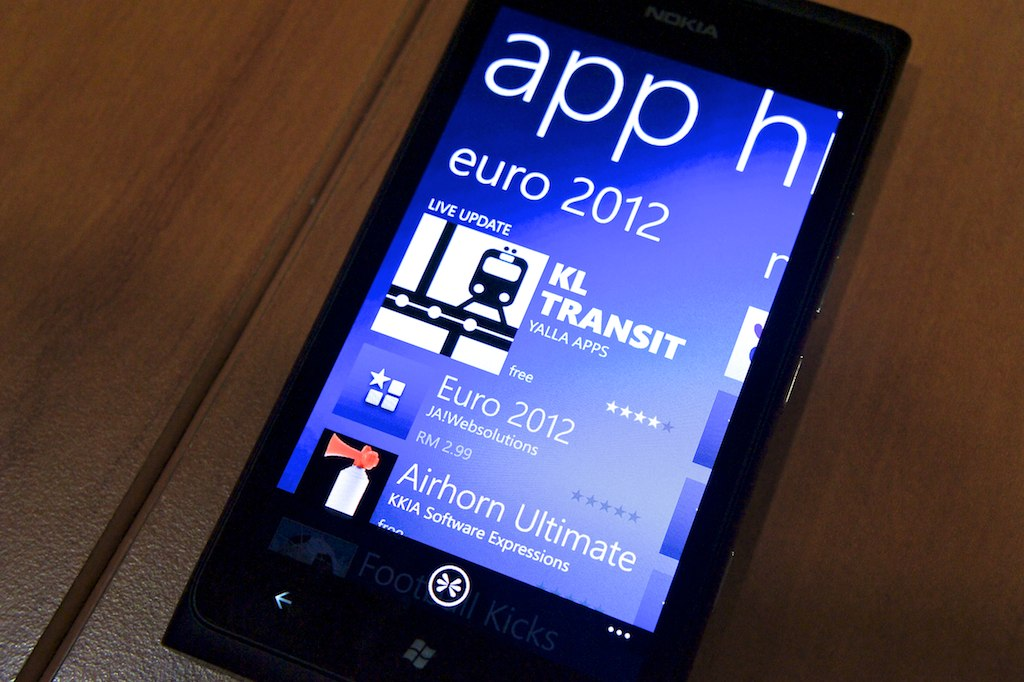 Tela frontal do Nokia Lumia 900 em junho de 2012.